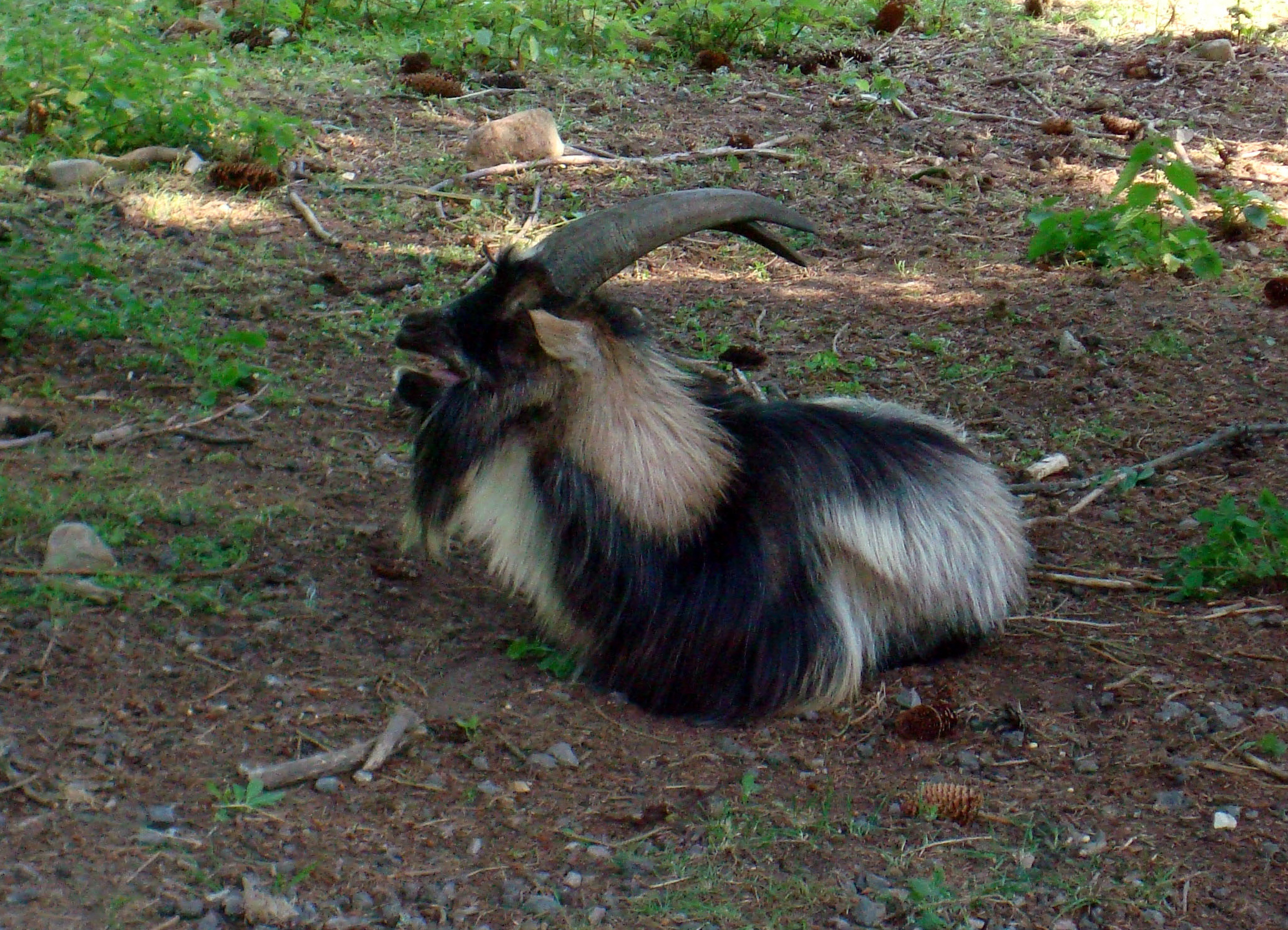 Tamget